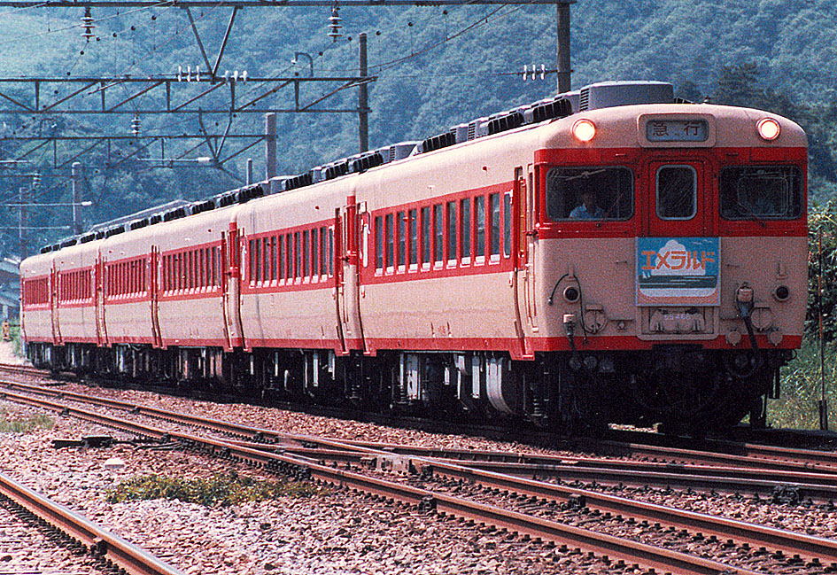 国鉄 急行エメラルド 東舞鶴行